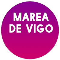 Logo político de Marea de Vigo